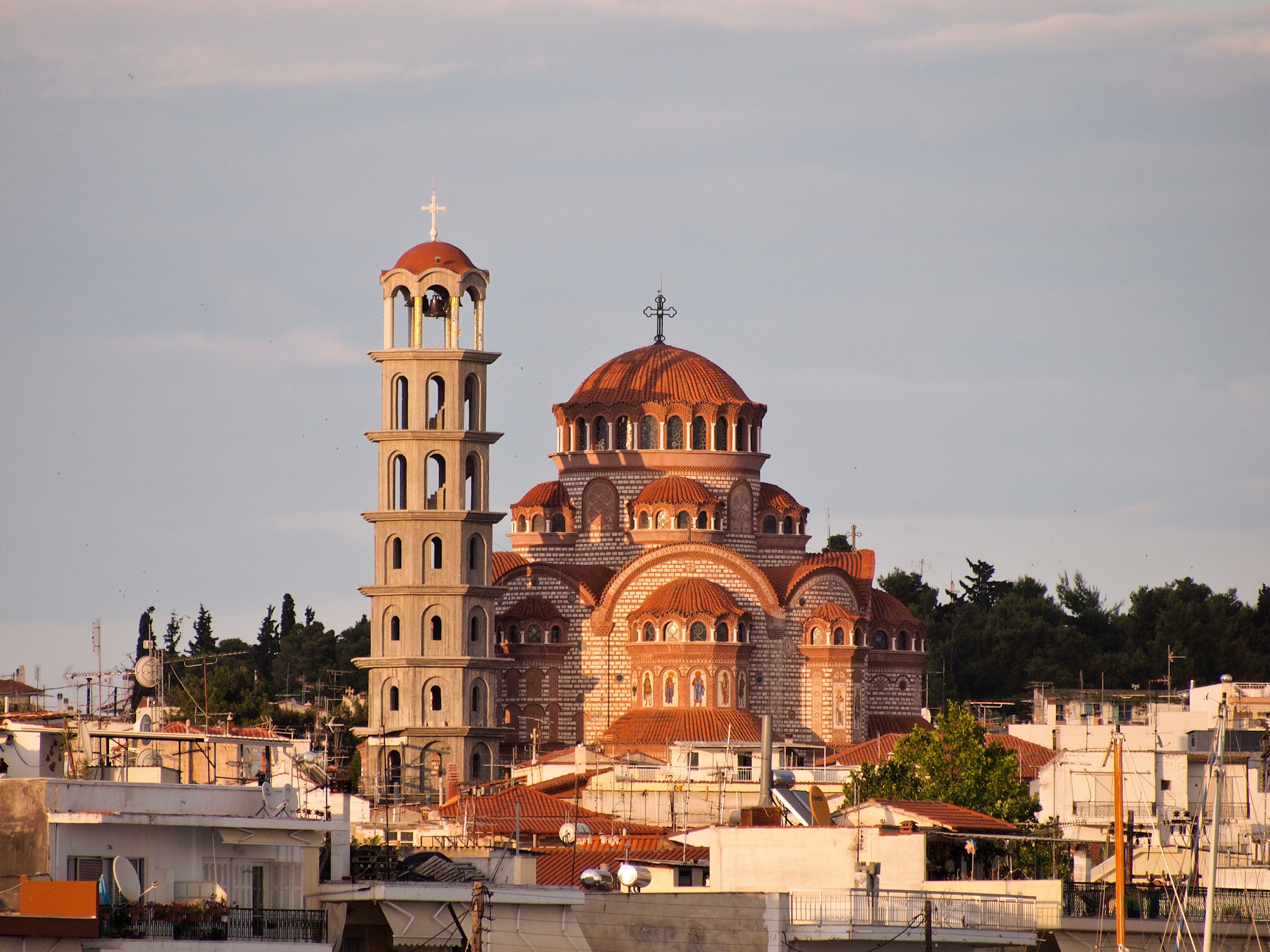 церковь Св. Георгия